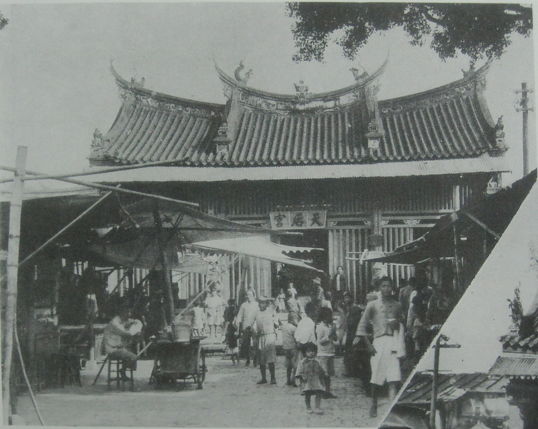 1933年前的臺南大天后宮